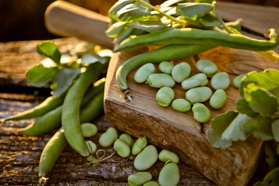 fava di Fratte Rosa